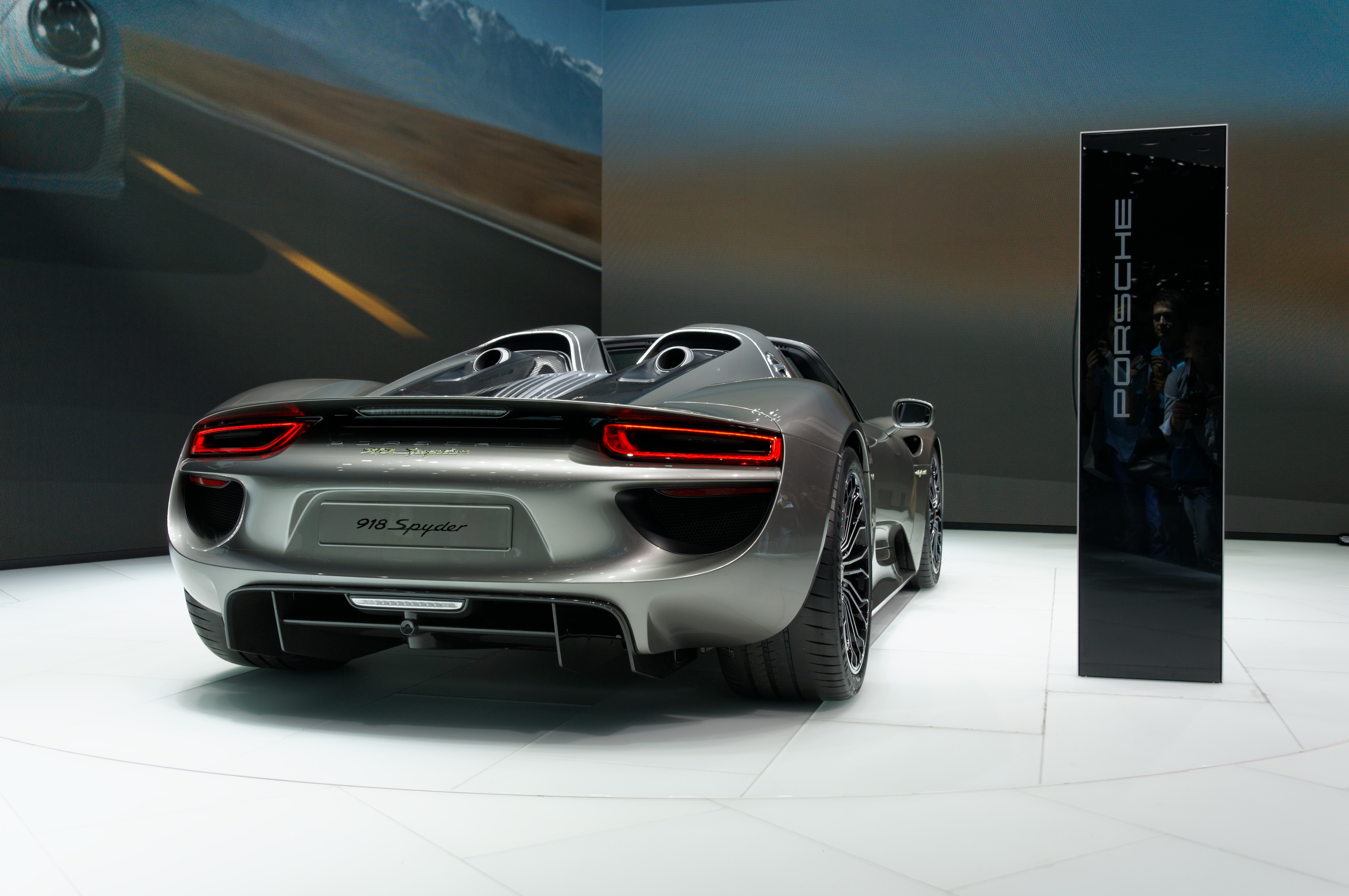 Porsche 918 Spyder